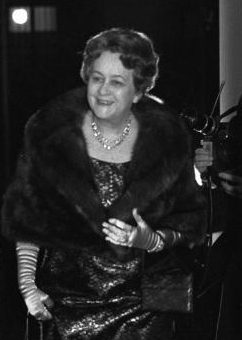 Title: Paris, Bankett Einweihung Deutsche Botschaft Extra information: Charles de Gaulle People in the image: Gaulle, Charles de: Staatspräsident, General, Frankreich Factual corrections and alternative descriptions are encouraged separately from the original description. Additionally errors can be reported at this page to inform the Bundesarchiv. Original historic description: Einweihung der deutschen Botschaftsresidenz, Palais Beauharnais, in Paris. 23-34 Empfang für Staatspräsident de Gaulle.